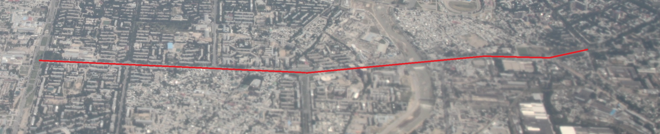 Dushanbe 205